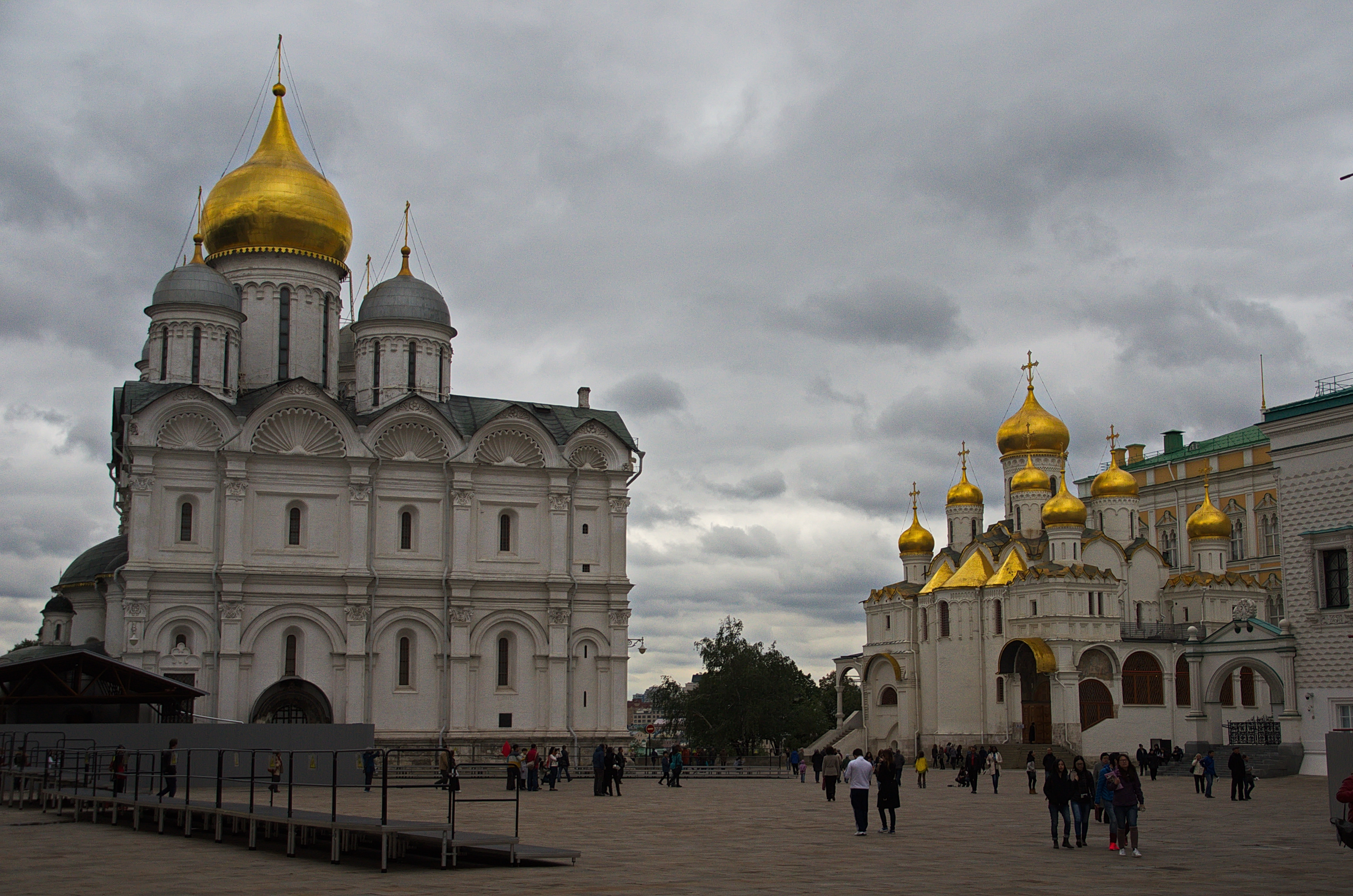 0979 - Moskau 2015 - Kreml